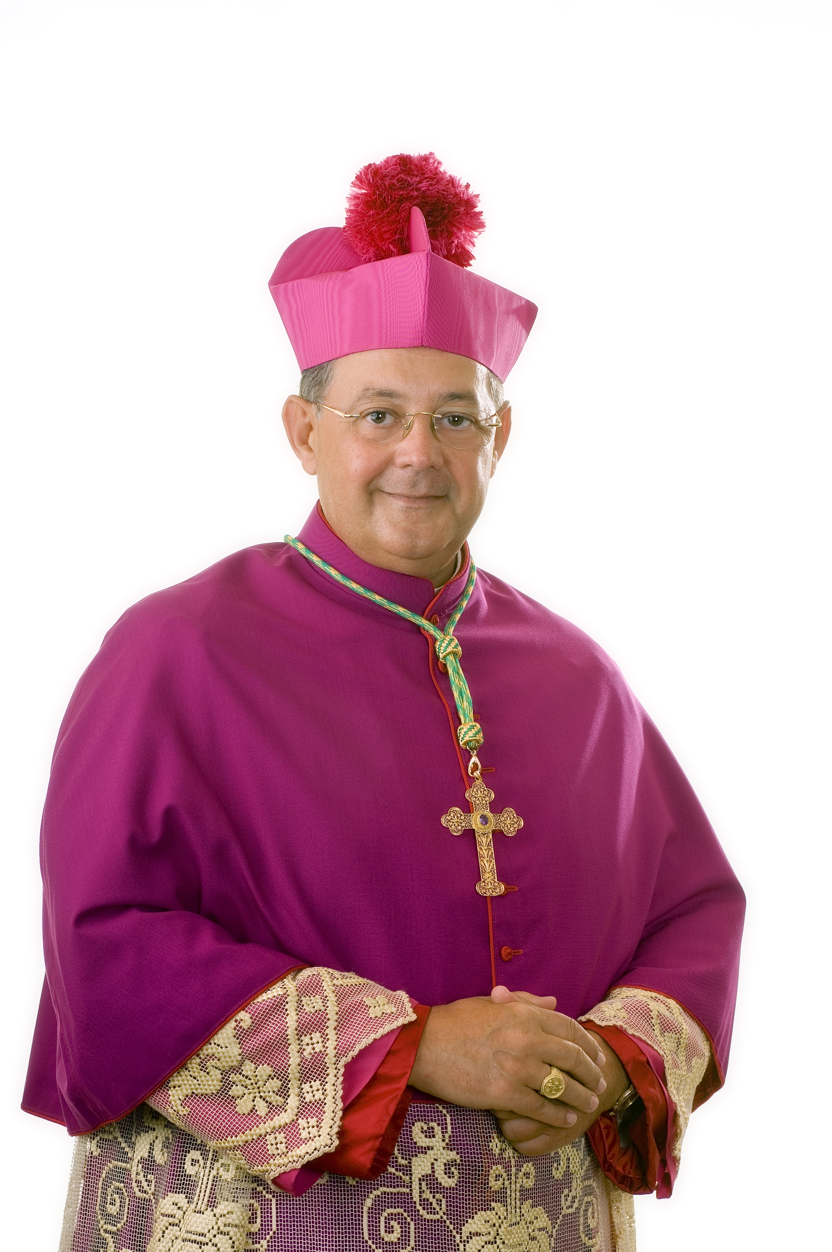 Foto che ritrae Mons. Vito Rallo, di proprietà del diretto interessato.